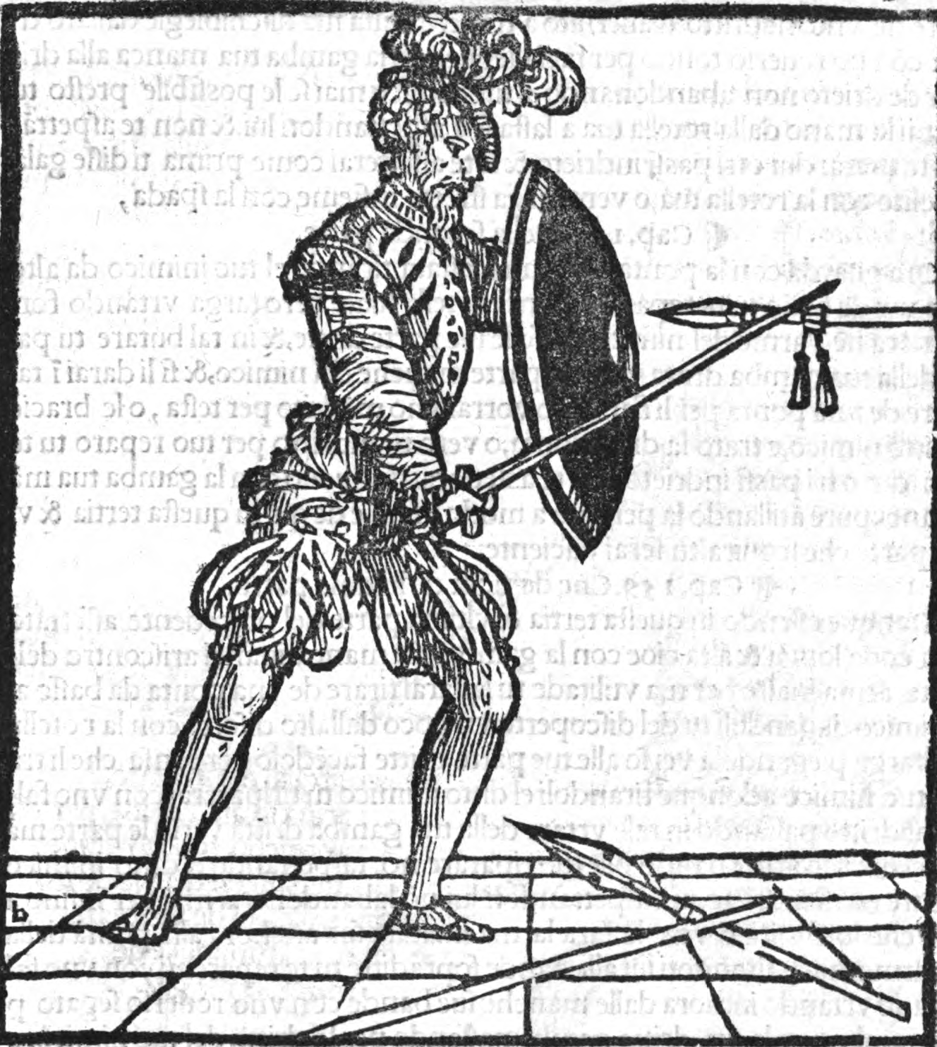 Illustration aus "Opera nova de Achilee Marozzo Bolognese, mastro generale de larte de larmi".